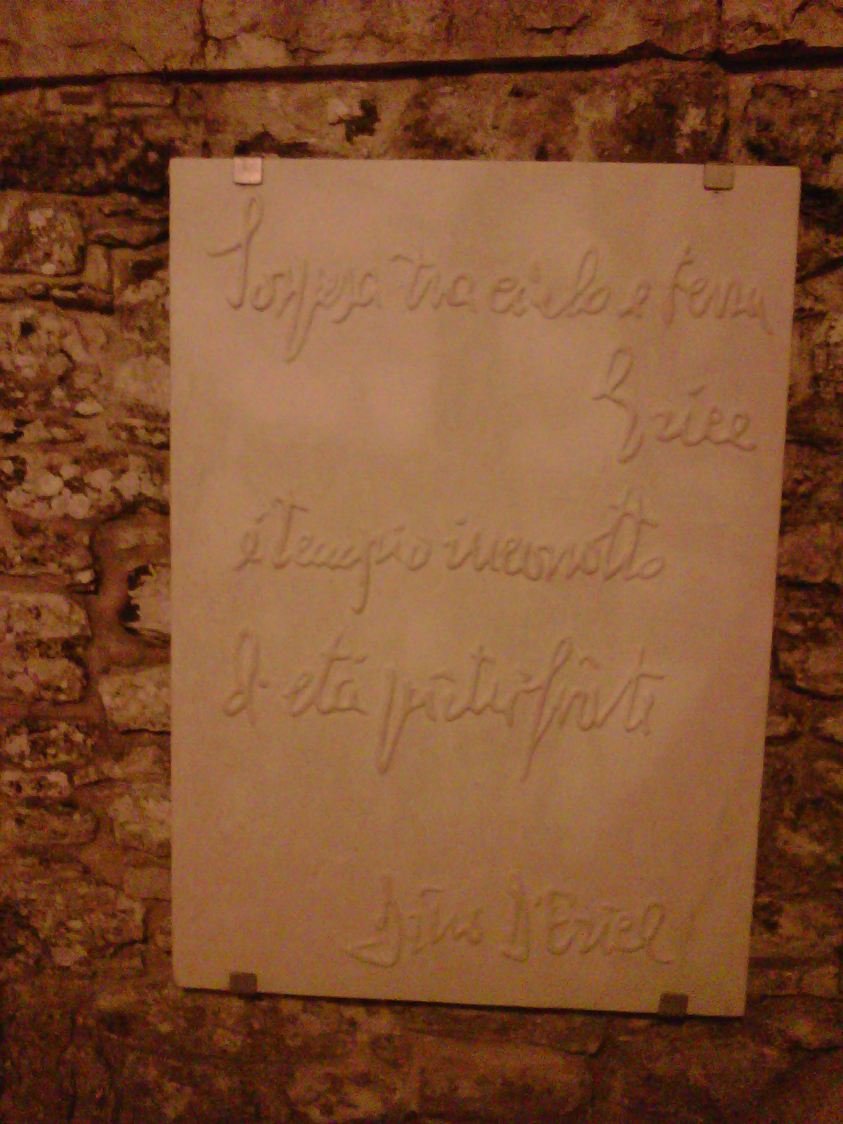 Omaggio a Erice di Dino D' Erice, Balio, Erice (TP) "“SOSPESA TRA CIELO E TERRA ERICE E’ TEMPIO INCORROTTO DI ETA’ PIETRIFICATE”", Dino D'Erice